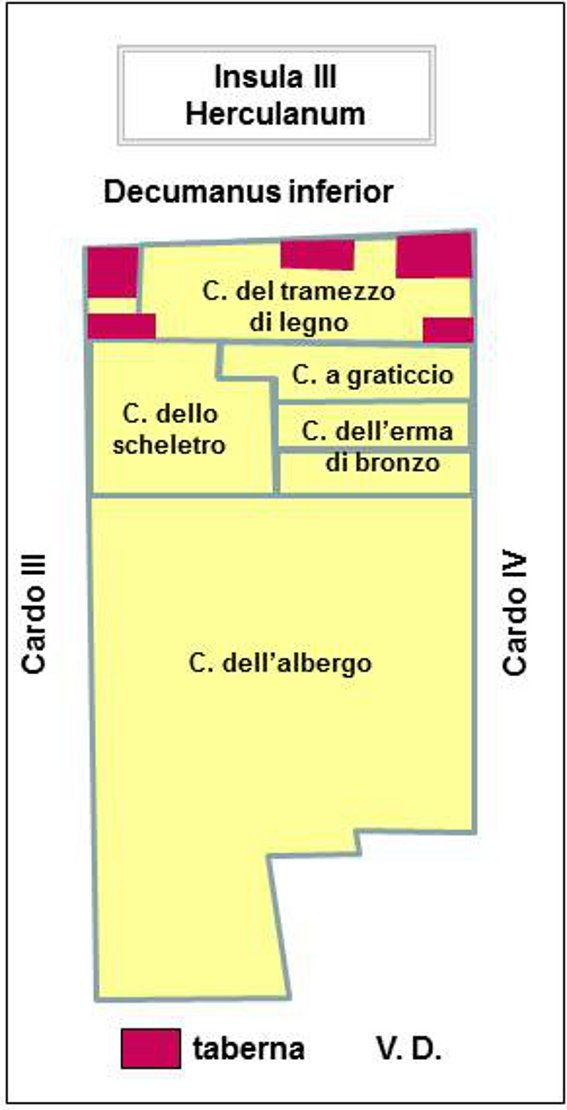 Herculanum Plan sommaire de l'insula III